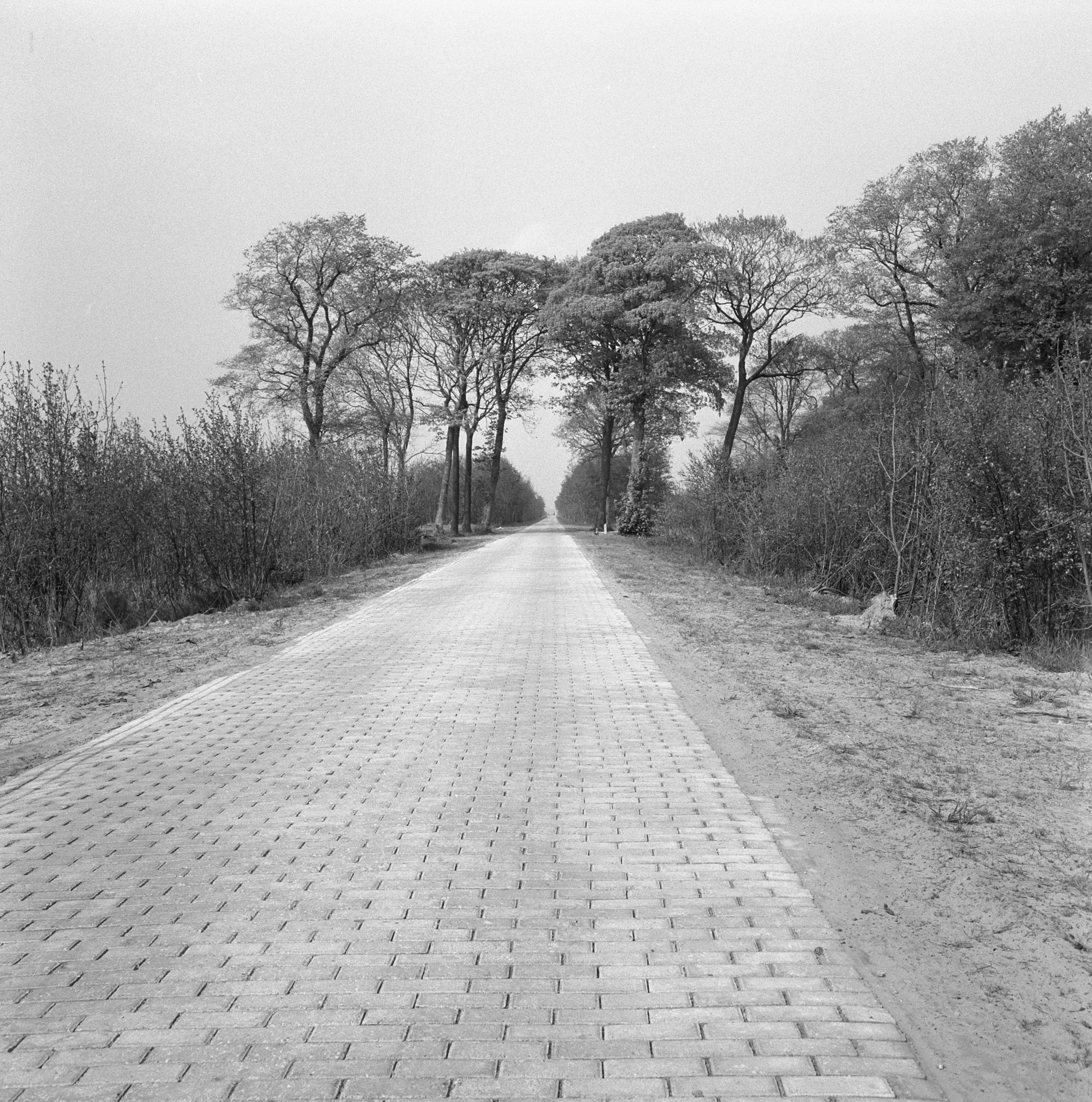 Collectie / Archief : Fotocollectie Nederlandse Heidemaatschappij Reportage / Serie : [ onbekend ] Beschrijving : aanleg en verbeteren van wegen, dijken en spaarbekken, ruilverkaveling, haskerveenpolder Datum : mei 1960 Trefwoorden : aanleg en verbeteren van wegen, dijken en spaarbekken, ruilverkaveling Persoonsnaam : haskerveenpolder Fotograaf : [onbekend] Auteursrechthebbende : Nationaal Archief Materiaalsoort : Negatief (zwart/wit) Nummer archiefinventaris : bekijk toegang 2.24.06.02 Bestanddeelnummer : 161-0992